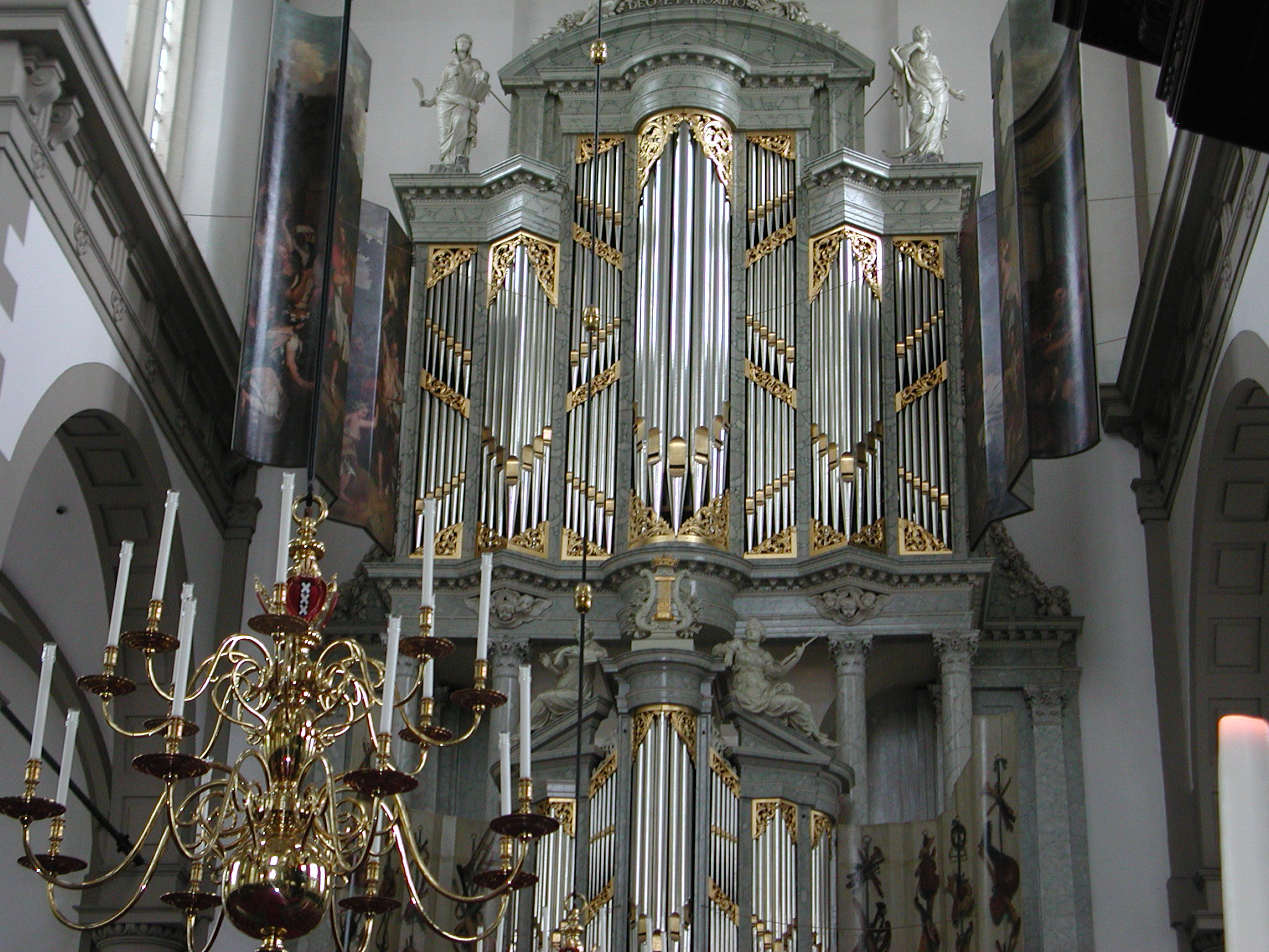 Pipe organ in the Westerkerk, Amsterdam. Doors by Gérard de Lairesse